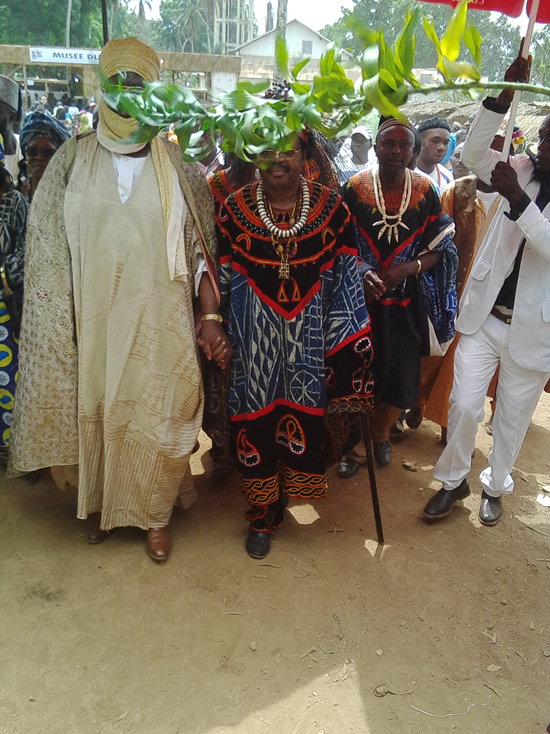 Ledit lancement s'était effectué par le Sultan Ibrahim MBOMBO NDJOYA et le Ministre des Arts et de la Culture Narcisse MOUELLE KOMBI. This is an image with the theme "Play" from: Cameroon